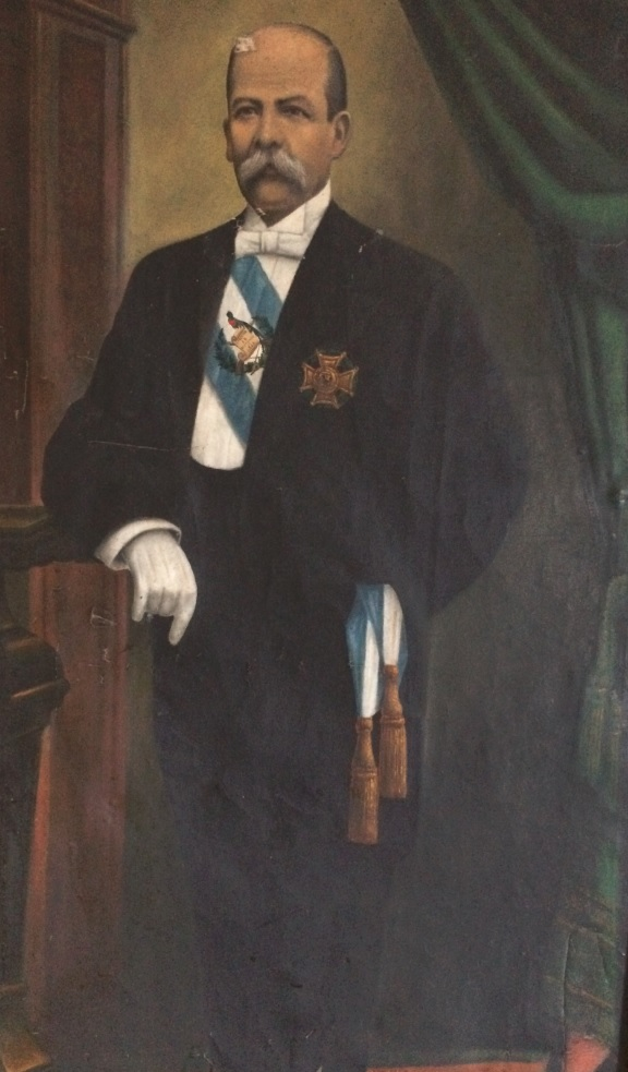 Retrato de Estrada Cabrera, localizado en el Museo Nacional de Historia de Guatemala